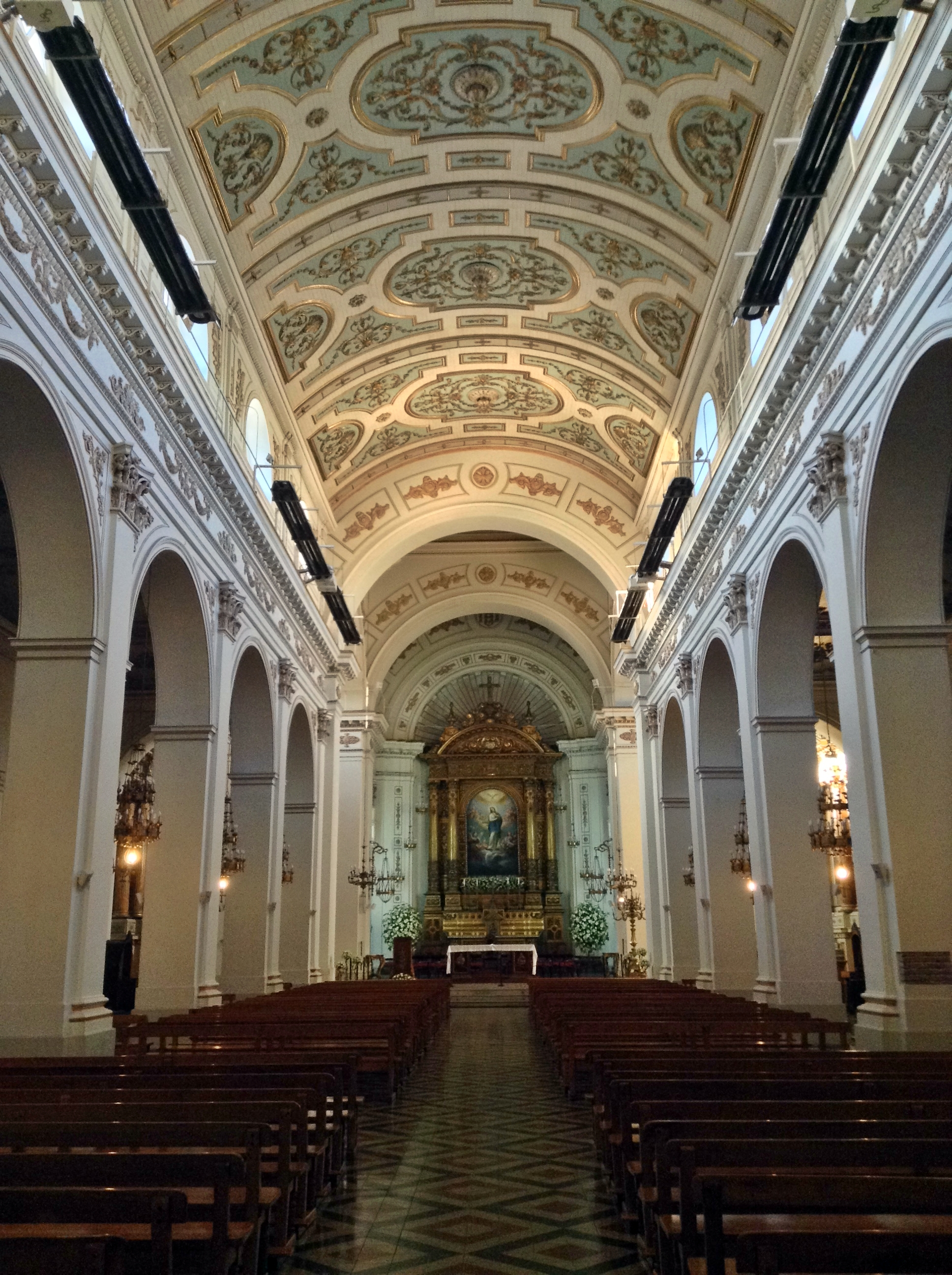 Iglesia de San Ignacio This is a photo of a national monument in Chile: 504